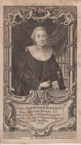 Otto Friedrich Hörner († 1781). Ein Abzug davon hängt in der Sakristei der Kirche Evangelisch Heilig Kreuz Augsburg, wo Otto Friedrich Hörner bis zum Tod gewirkt hat.